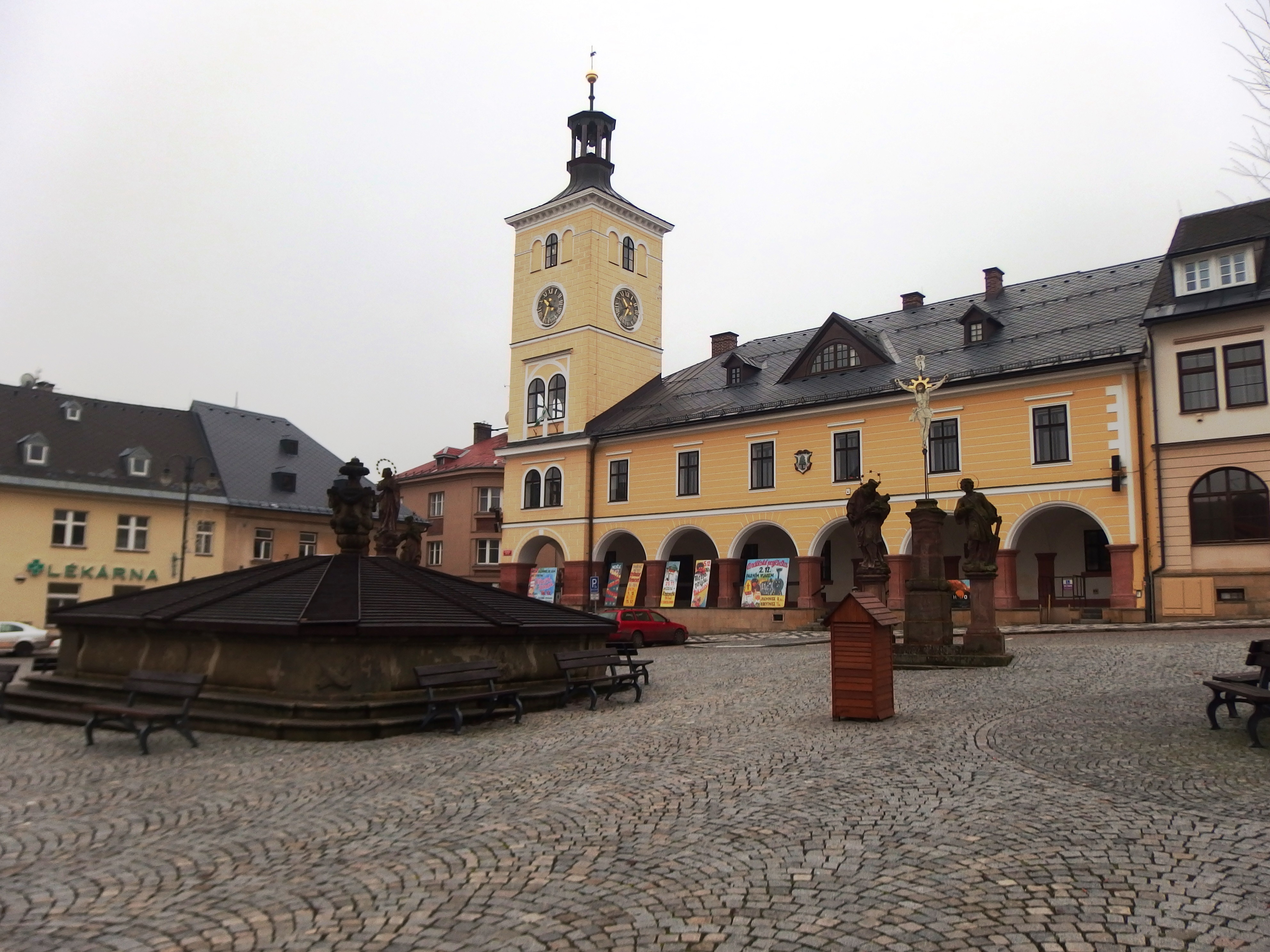 Radnice, Masarykovo náměstí 82, Jilemnice.